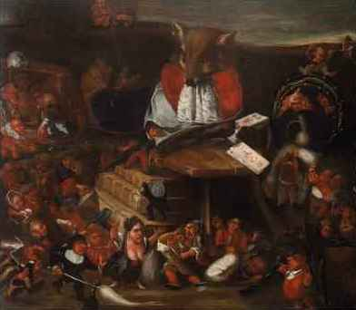 Enrico Albrici (1714-1775), La volpe e i nani, Olio su tela, cm73X84, collezione privata.